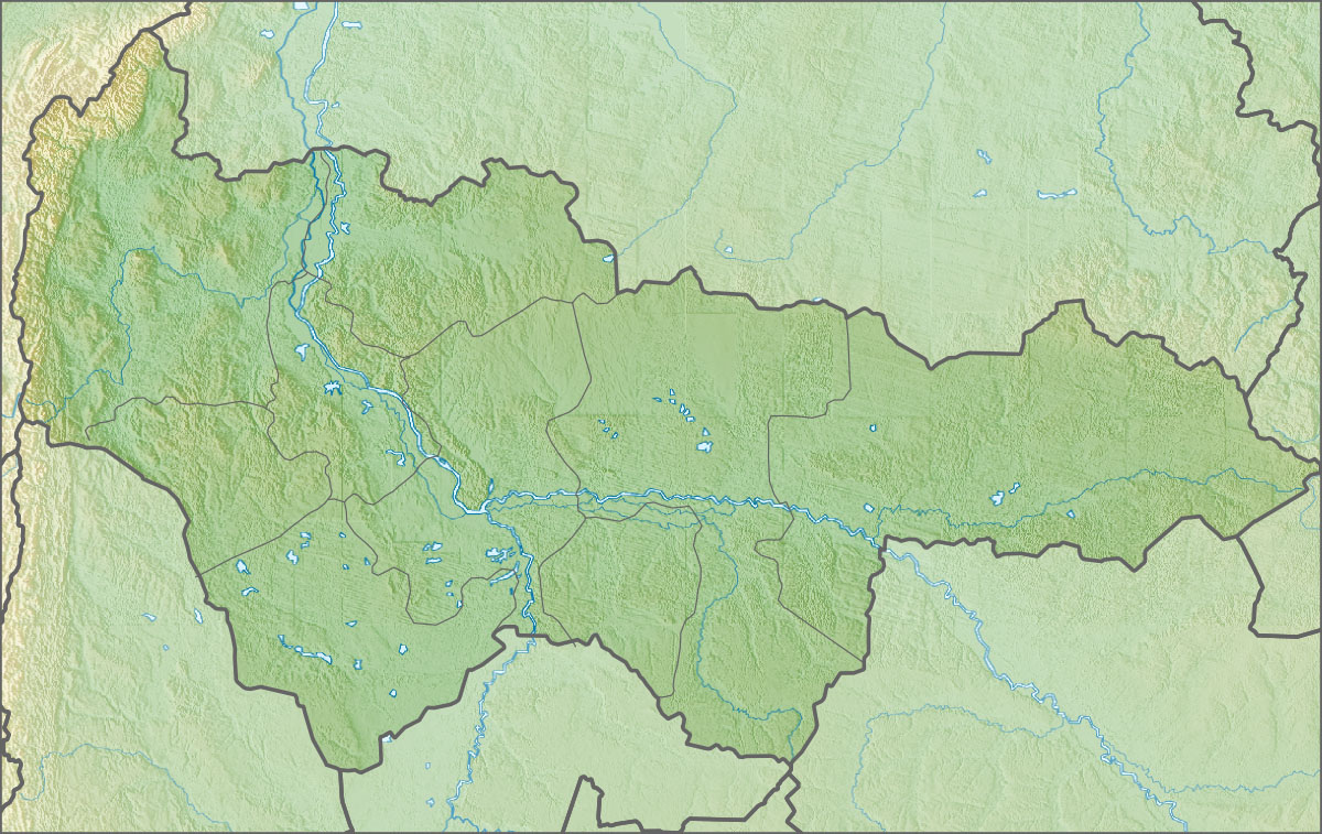 Физическая карта Ханты-Мансийского автономного округа Проекция — равноугольная. Стандартная параллель — 62°00'с.ш. Параметры шаблона (координаты краёв): | top = 66 | bottom = 58 | left = 59 | right = 86